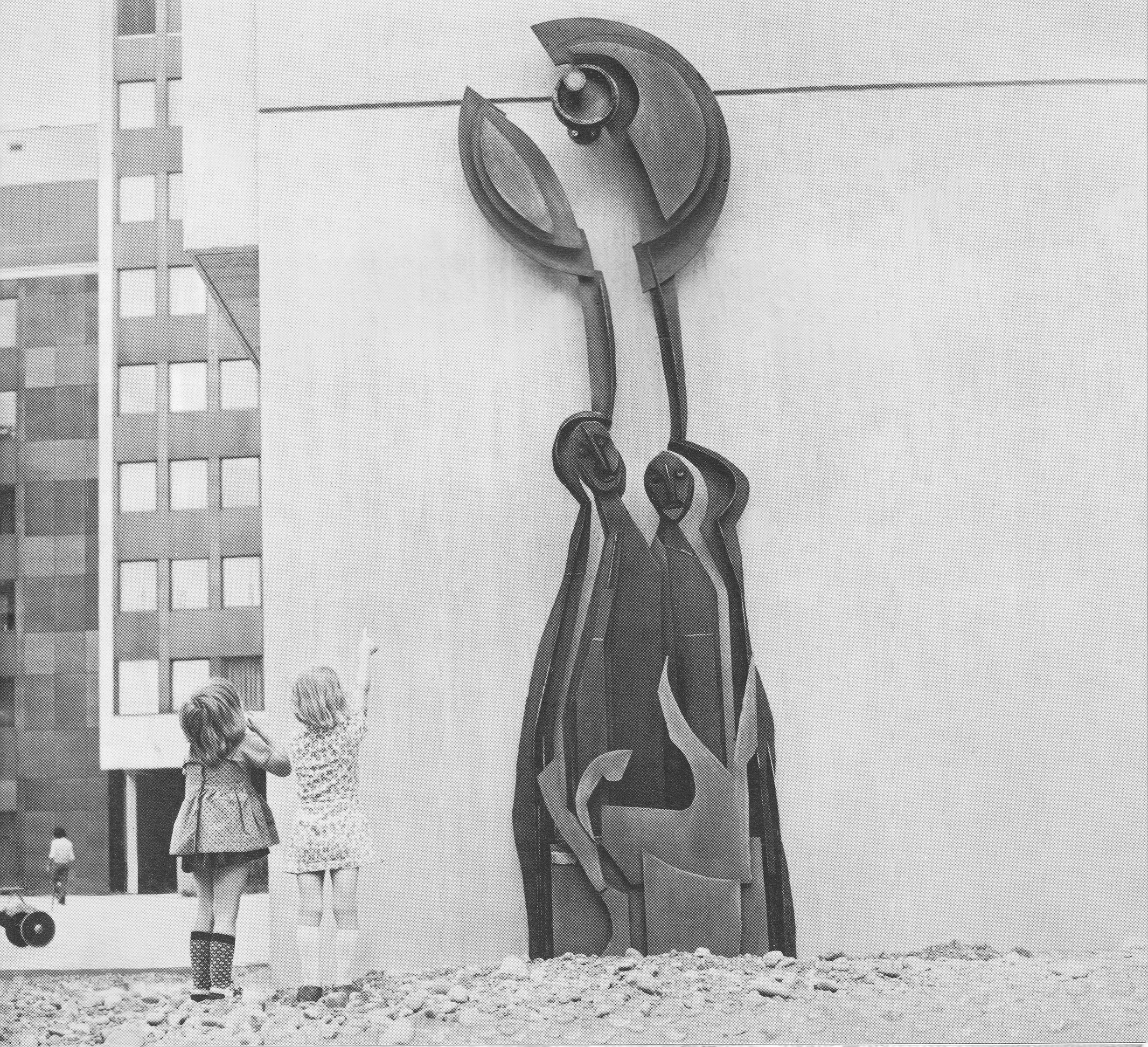 Eisenplastik Begegnung von Jean Bünter vor dem Altersheim Werdgässchen Zürich